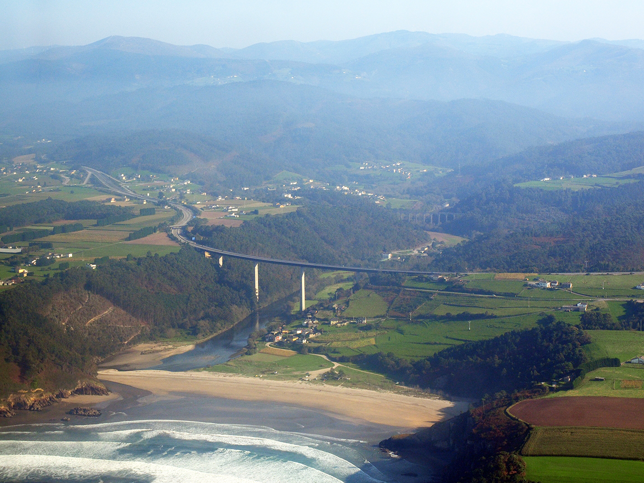 Playa de Cueva y rio Esva